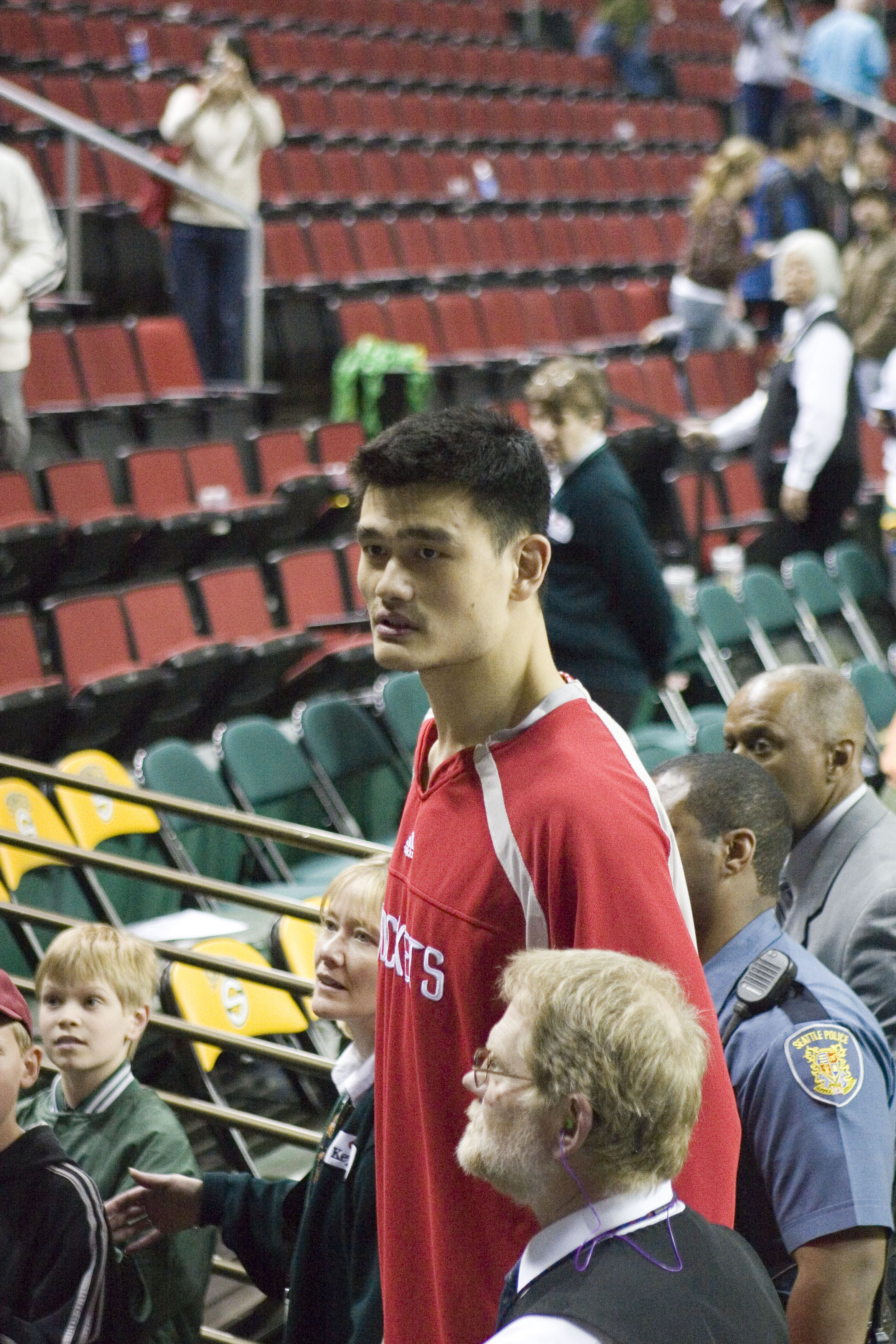 NBA player Yao Ming